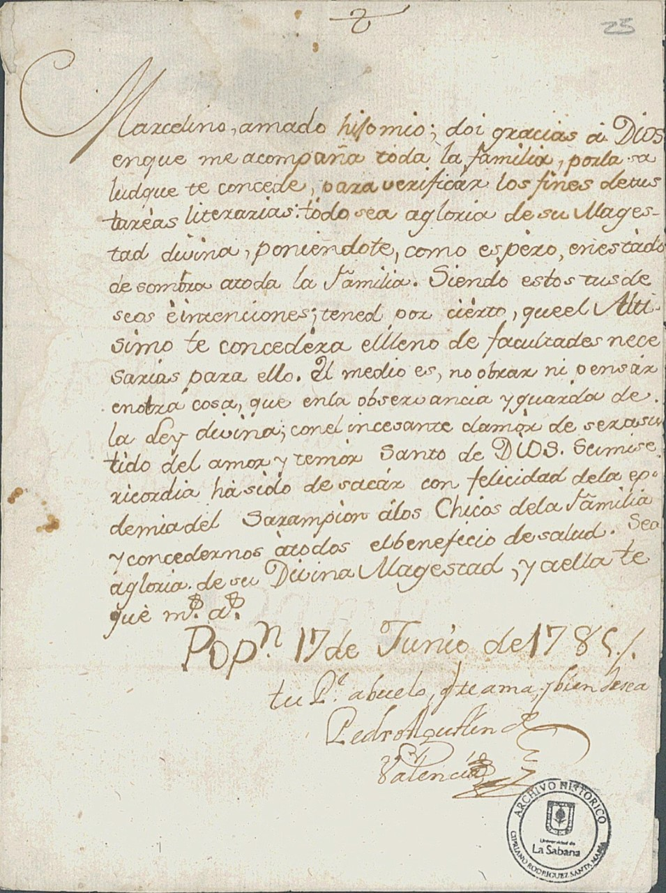 Carta de Pedro Agustín de Valencia a su nieto Marcelino Pérez de Arroyo